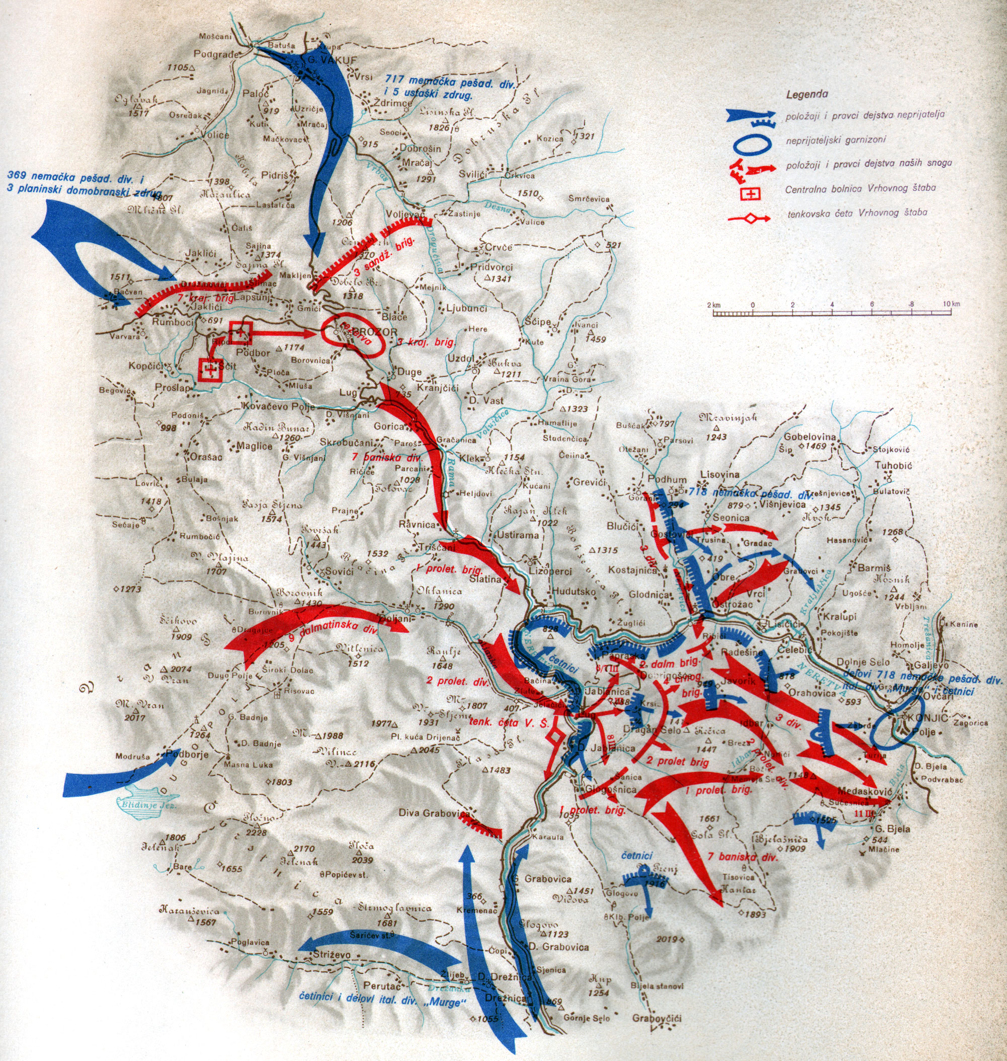 Srpskohrvatski / српскохрватски: Forsiranje reke Neretve (od 6 do 15 marta 1943 godine)